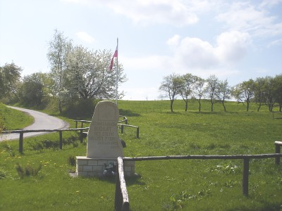 Stanisławów - pomnik na polanie w centralnej części wsi